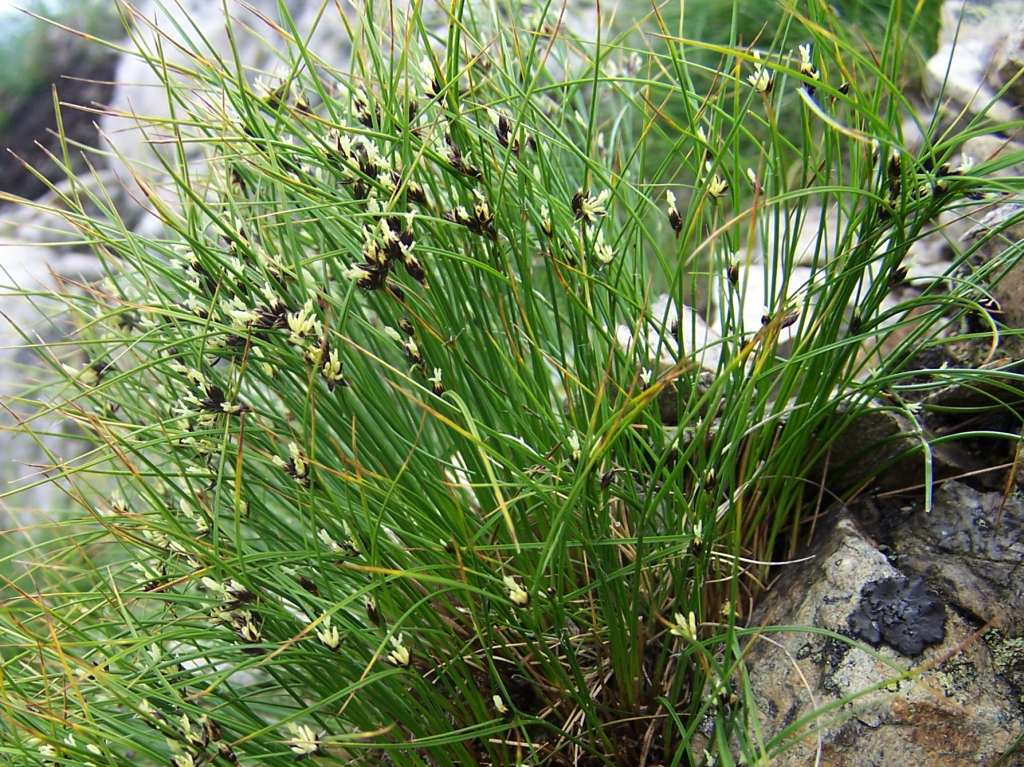 Juncus trifidus (pl. sit skucina), habitat: Tatra Mountains, Ornak